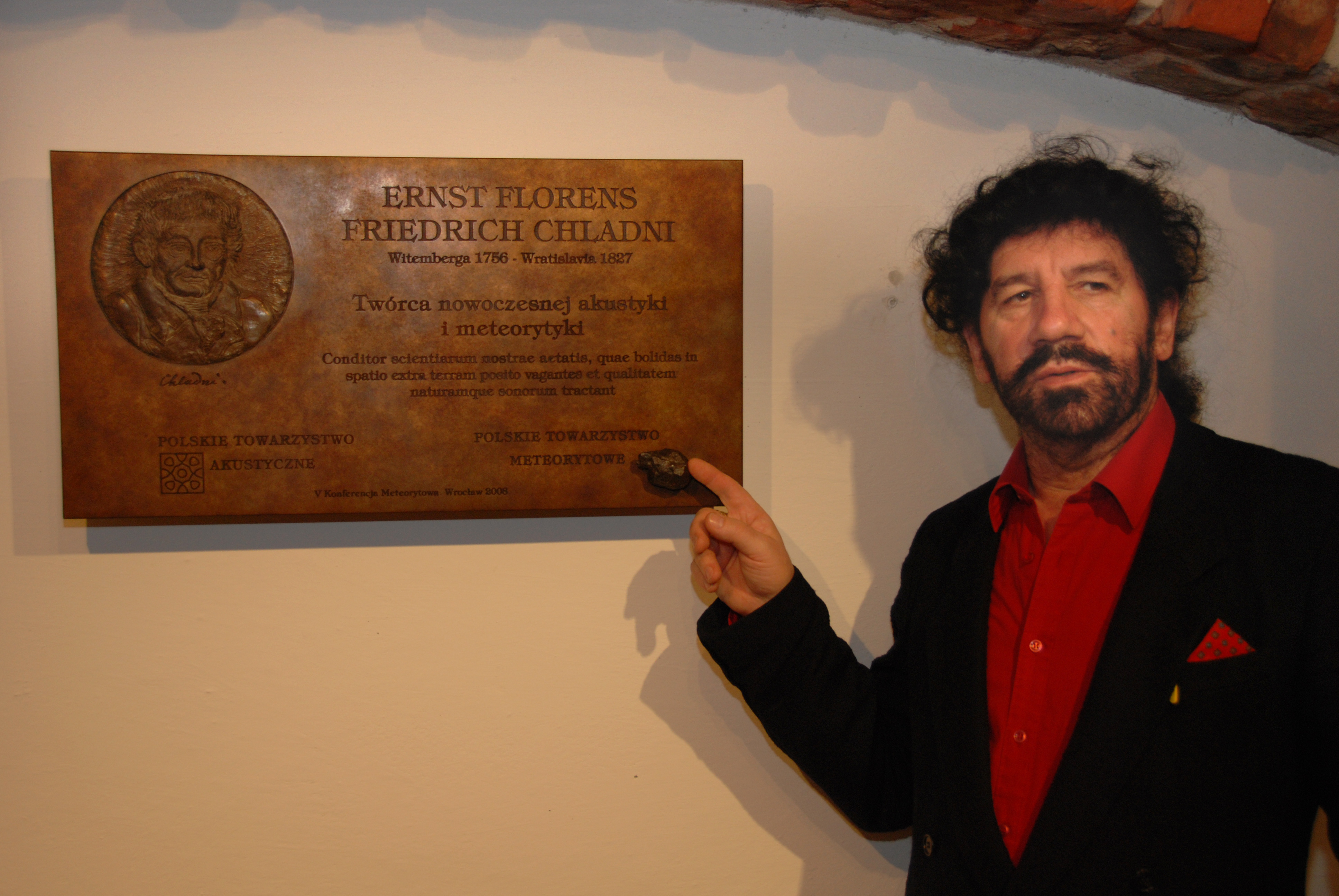 Zbigniew Kresowaty przy tablicy Ernst Florens Friedrich Chladni; Witemberga 1756 - Wratislavia 1827; Twórca nowoczesnej akustyki i meteorytyki